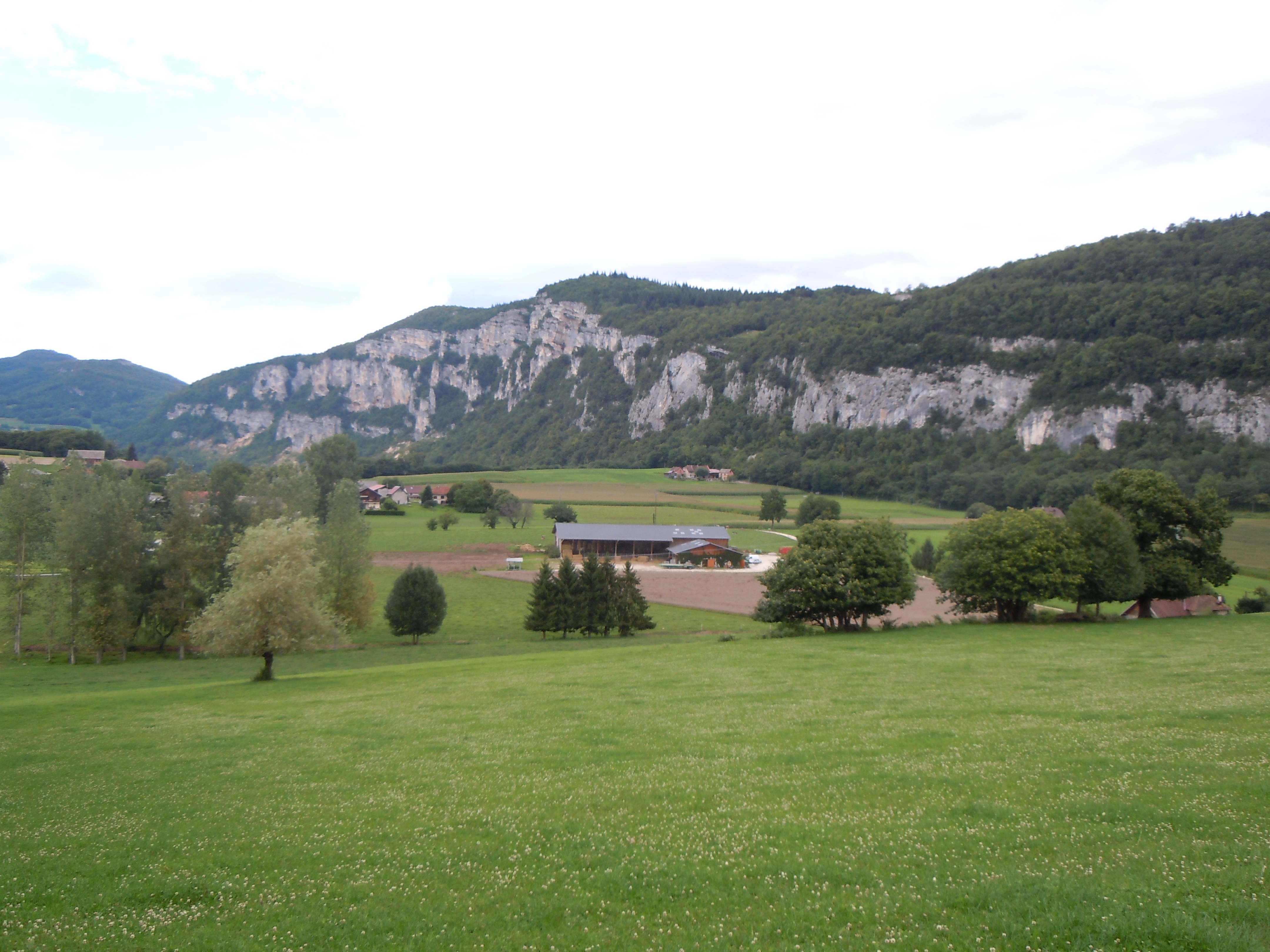 Verel-de-Montbel - L'Etang